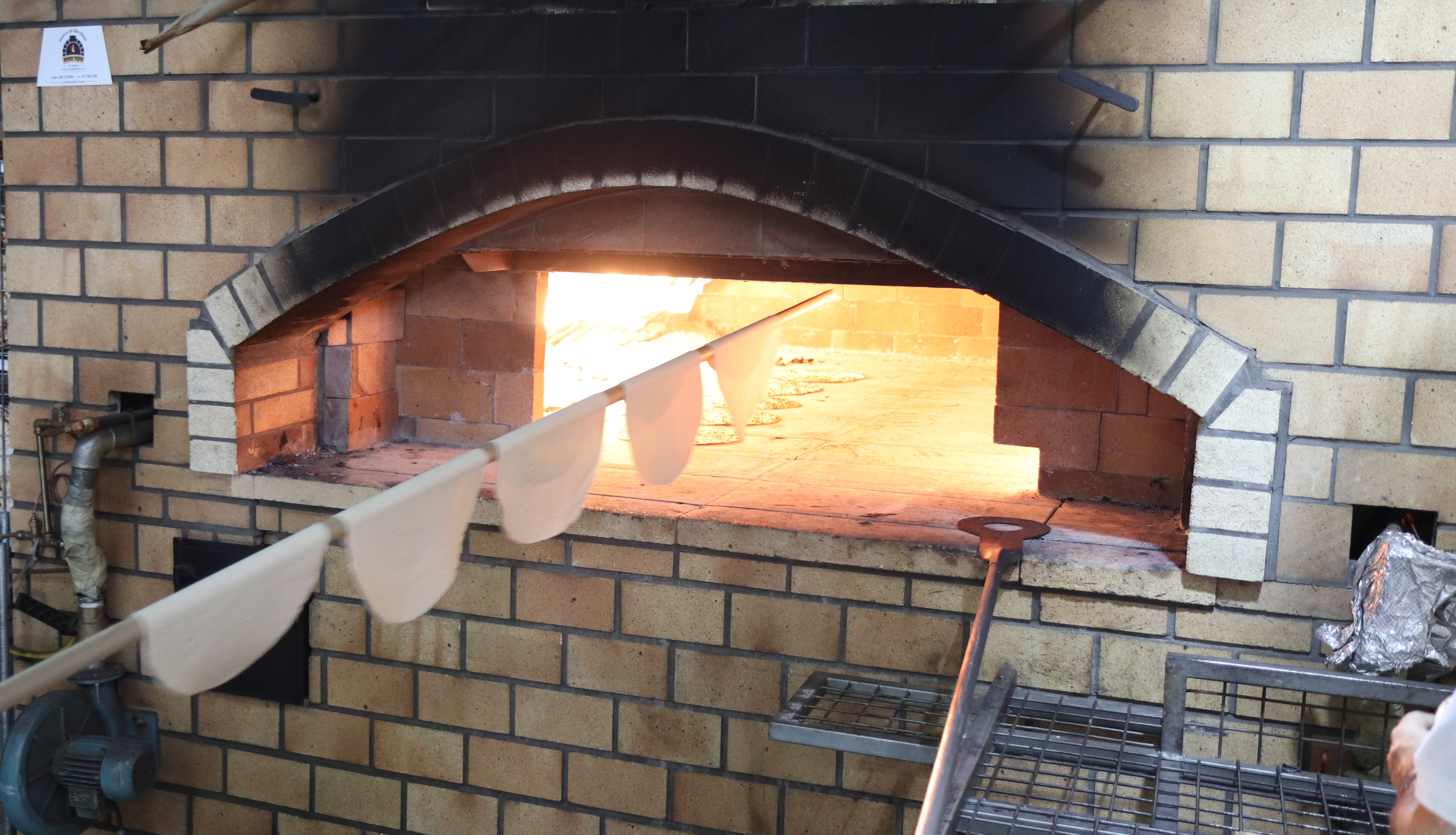 אפיית המצות בתנור העשוי מאבן. פסח תשע"ט